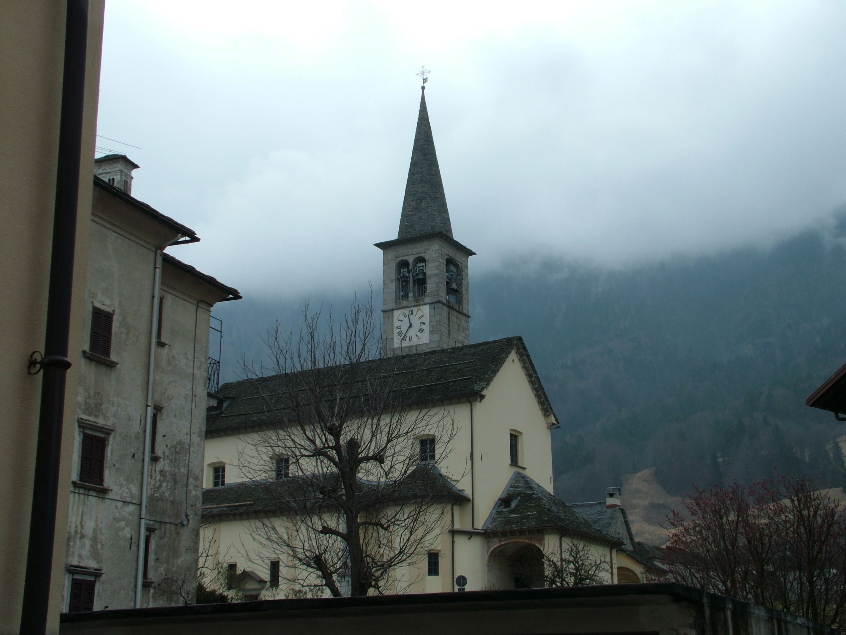 Malesco, Piemont, Italien, die Kirche